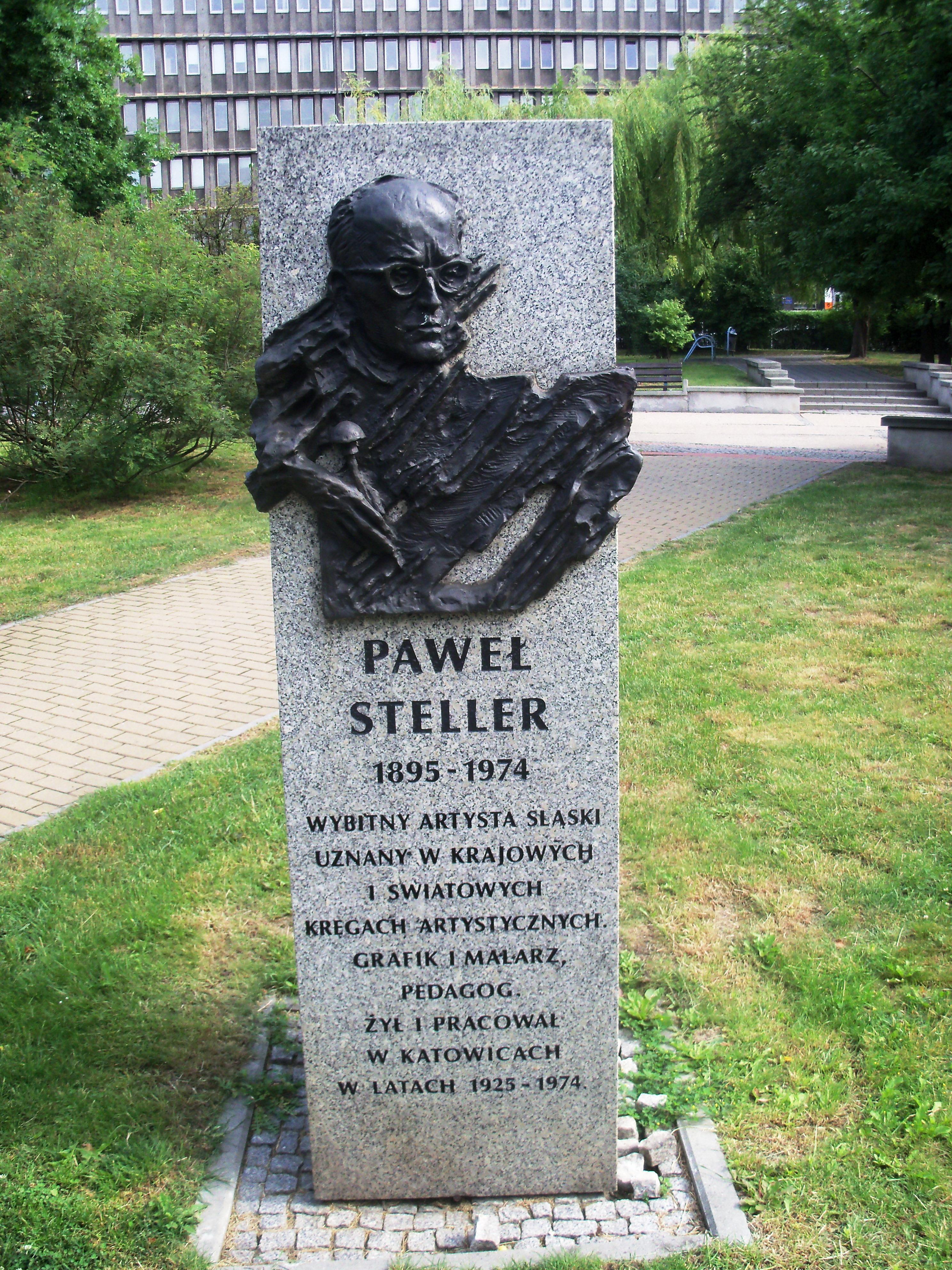 Galeria Artystyczna na placu Grunwaldzkim w Katowicach: Rzeźba przedstawiająca Pawła Stellera